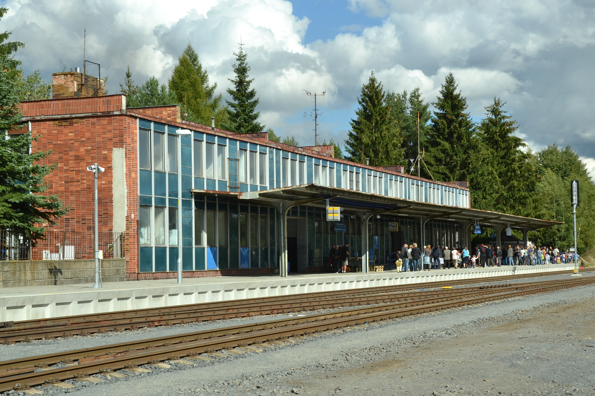 Bahnhof Asch, Empfangsgebäude